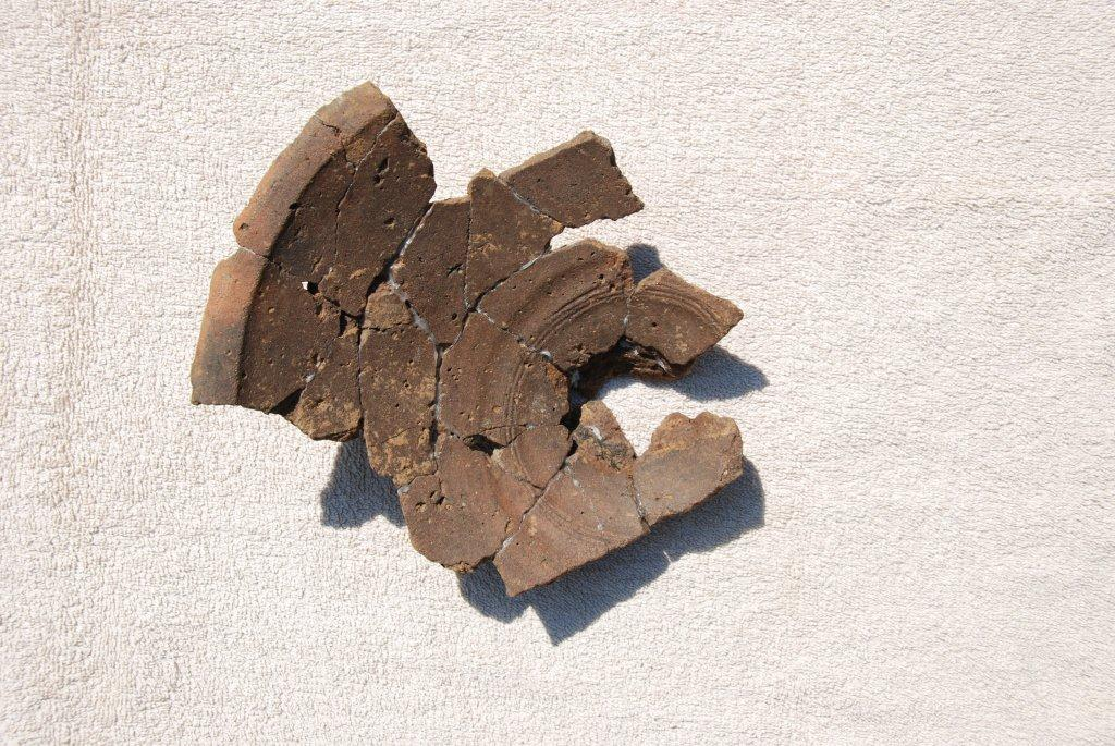 Fragment de vase daté de la fin de l'âge du bronze. (Ury, Seine-et-Marne, région Île-de-France).